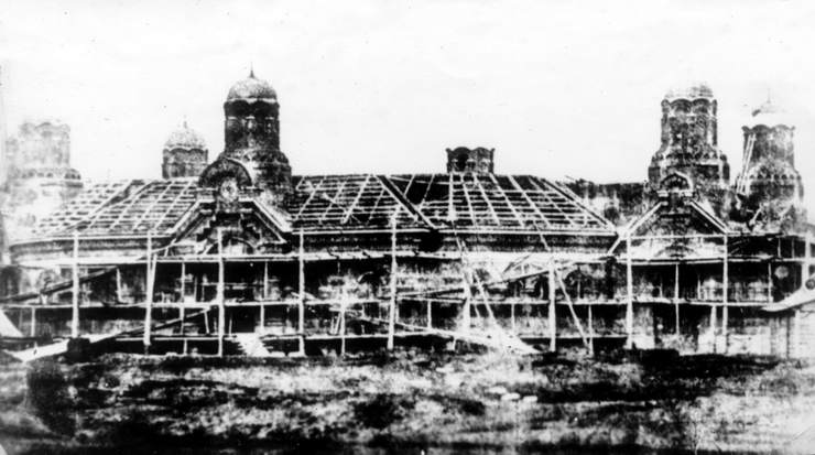 Самара. Строительство Кафедрального собора. Фотография. ~1870-е годы.